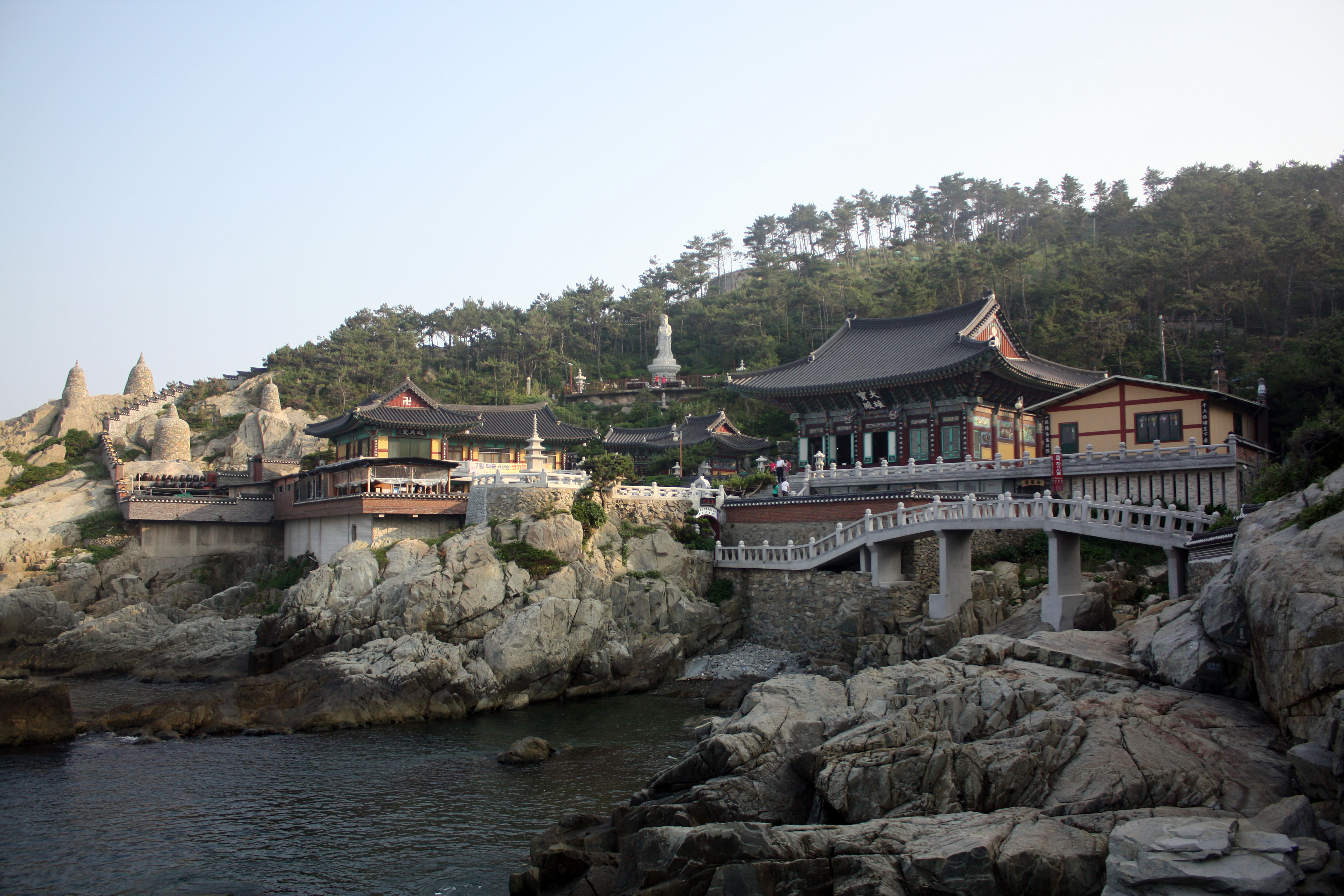 부산광역시 기장군 기장읍 사랑리에 있는 해동용궁사 사찰 전경입니다.